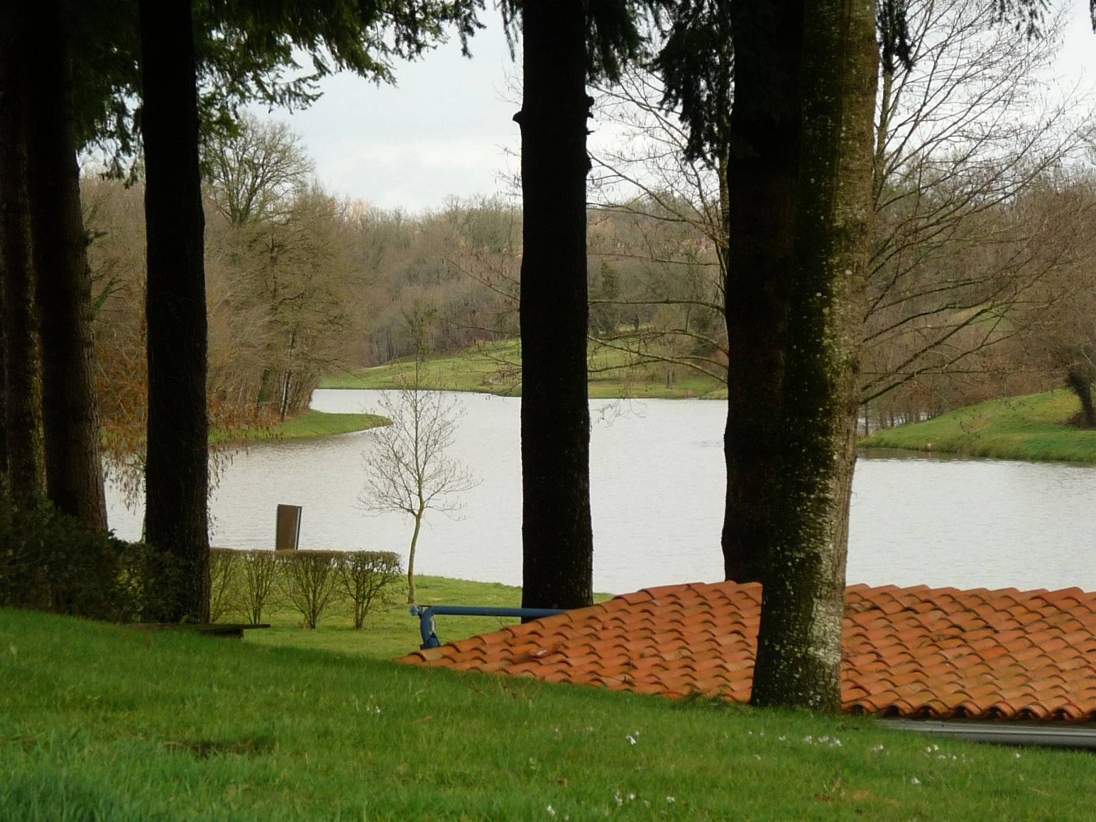 partie amont du lac du Mas Chaban, Massignac, Charente, France